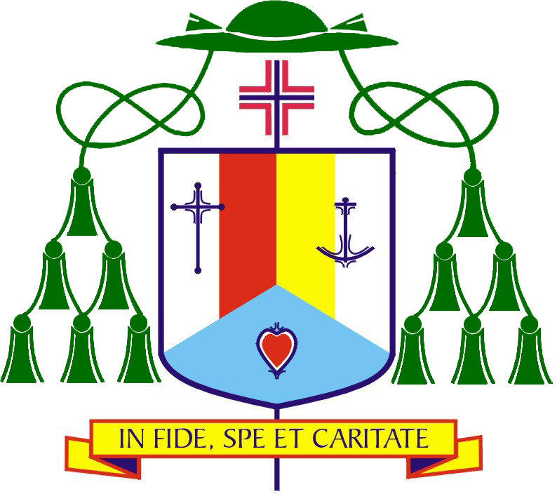 Herb bp Janusz Kaleta